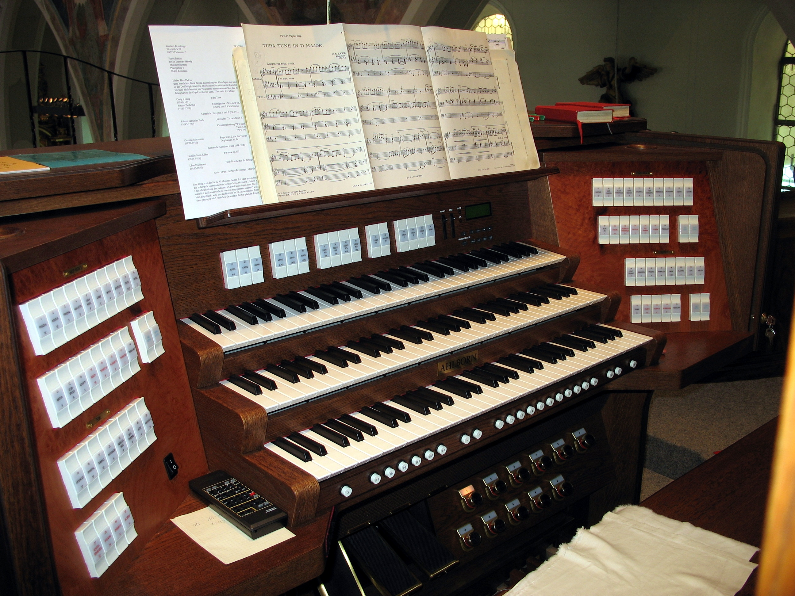 Konstanz, Dreifaltigkeitskirche, Spieltisch der Orgel